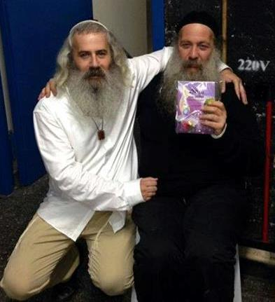 שלומי שטרן ושולי רנד